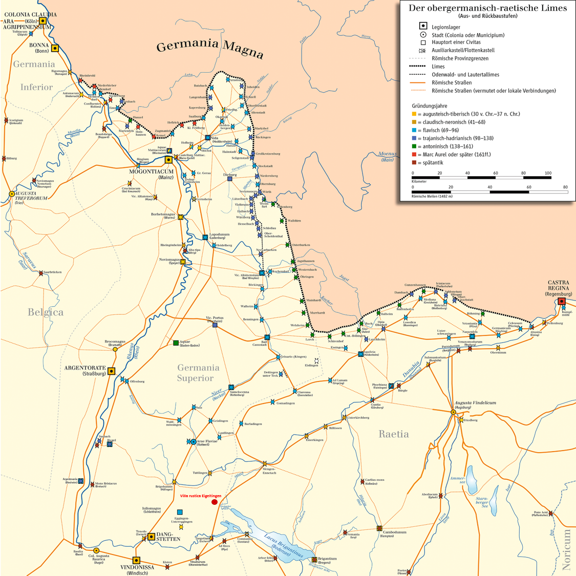 Deutschland (D) - Baden-Württemberg (BW) - Landkreis Konstanz (KN) - Eigeltingen: Lage des Römischen Gutshofs (Villa rustica) in Germania Superior